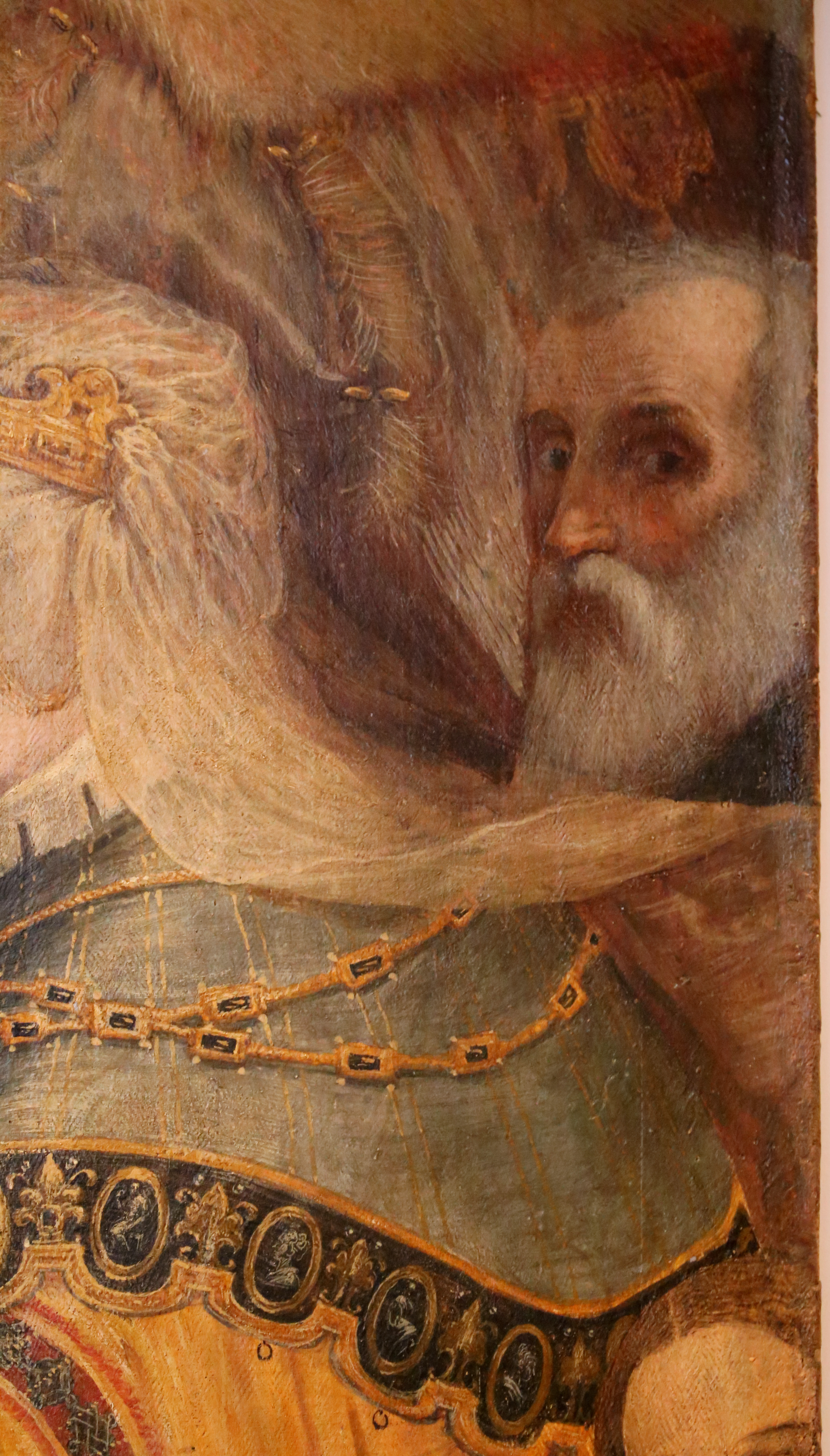 chiesa di San Giacomo Apostolo dei Domenicani This is a photo of a monument which is part of cultural heritage of Italy.